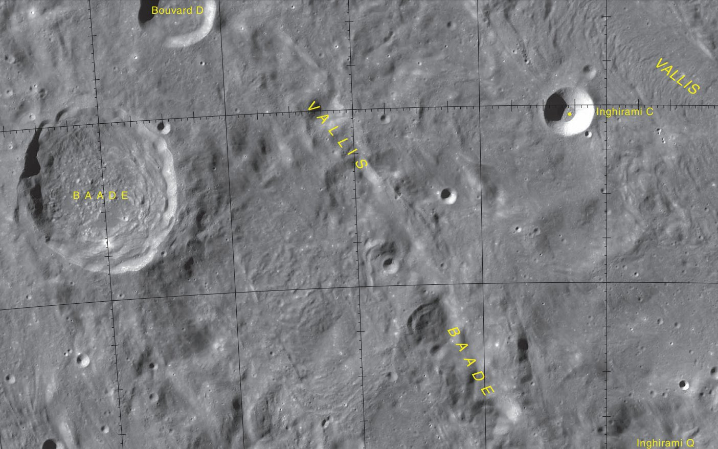 Vallis Baade. (Imagen LRO)